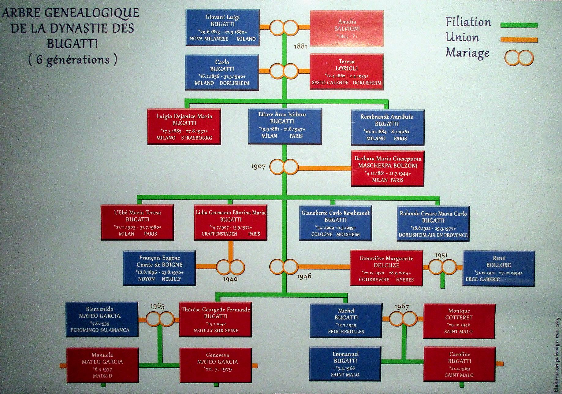 Arbre généalogique de la famille Bugatti, musée Bugatti Molsheim